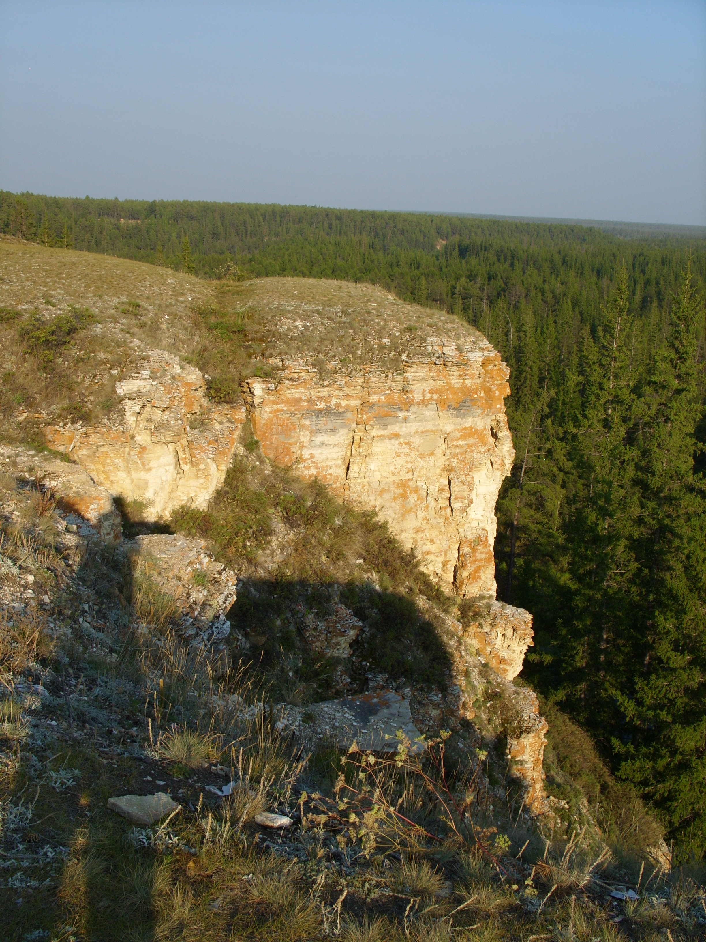 на р. Лютенге, Хангаласский улус, Якутия